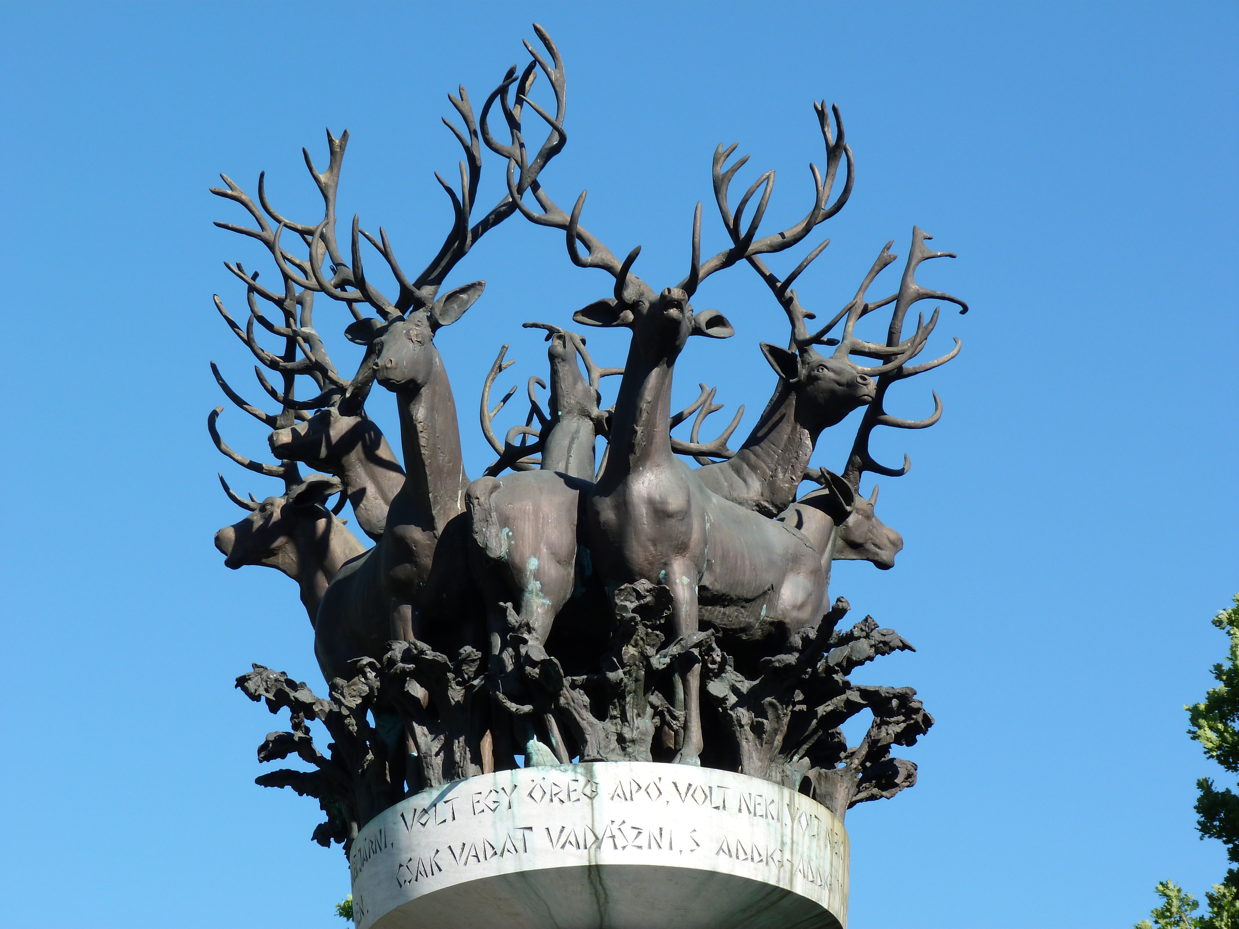 A felvétel 2013. Május 20 –án Pünkösd hétfőn Budapesten, a Hegyvidéken. Budapest XII. ker. Királyhágó tér. Marton László szobra, 2000. Volt egy öreg apó. Volt neki kilenc szép szál fia. Nem nevelte őket semmi mesterségre. Csak erdőket járni. Csak vadat vadászni, s addig - addig vadászgattak. Addig: szarvassá változtak ott a nagy erdőben Szarvassá változott fiúk. ©© Derzsi Elekes Andor, Budapest, 2013, You are authorised to use this photo under Creative Commons – even for commercial, for profit purposes. Photos must be attributed to Derzsi Elekes Andor. All of the photos and vids in the Metapolisz DVD line are under Creative Commons and can be used even for commercial – for profit – purposes. Recommended Citation Derzsi Elekes Andor: Metapolisz DVD line